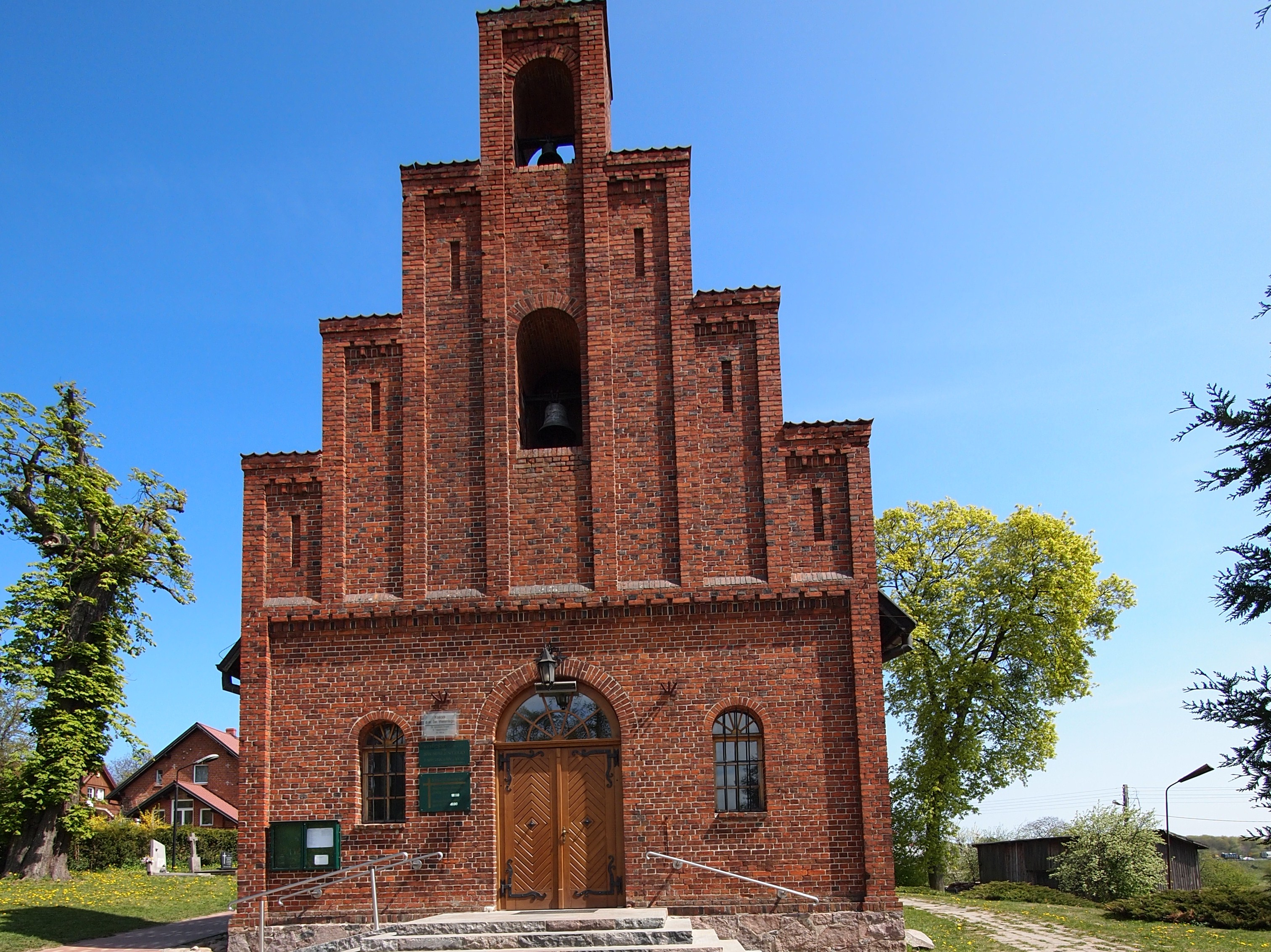 Gdańsk Matarnia, kościół św. Walentego.